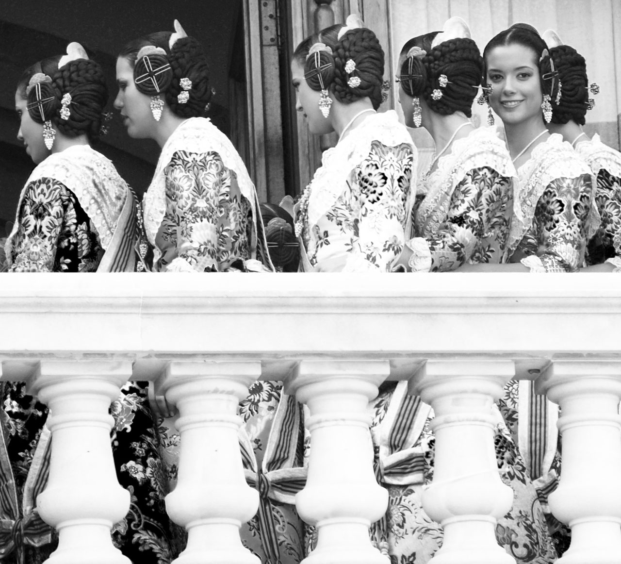 Balcón del Ayuntamiento de Valencia. Falleras de 2008